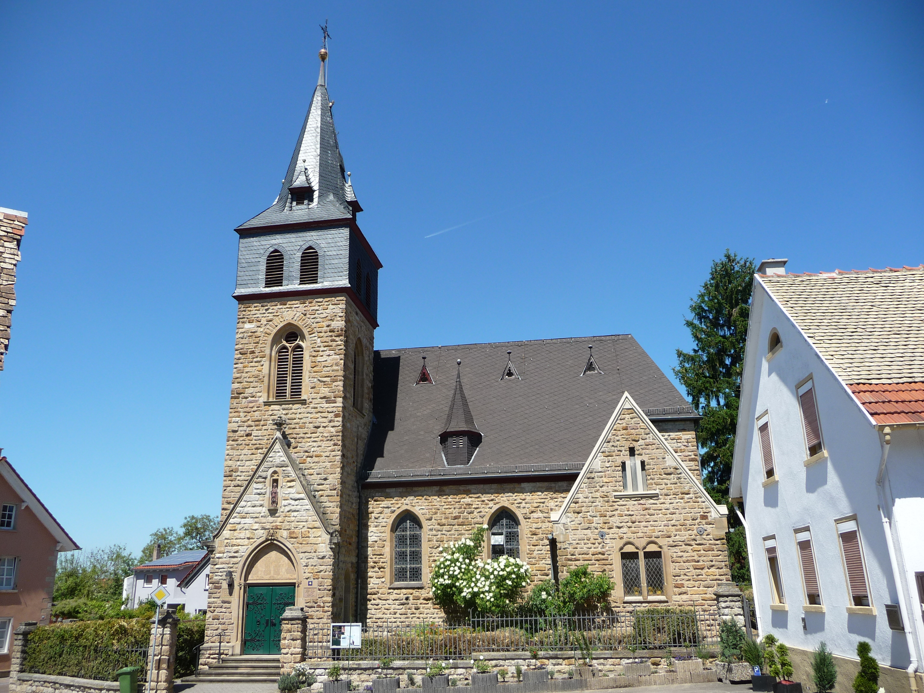 katholische Kirche in Framersheim, Landkreis Alzey-Worms in Rheinland-Pfalz